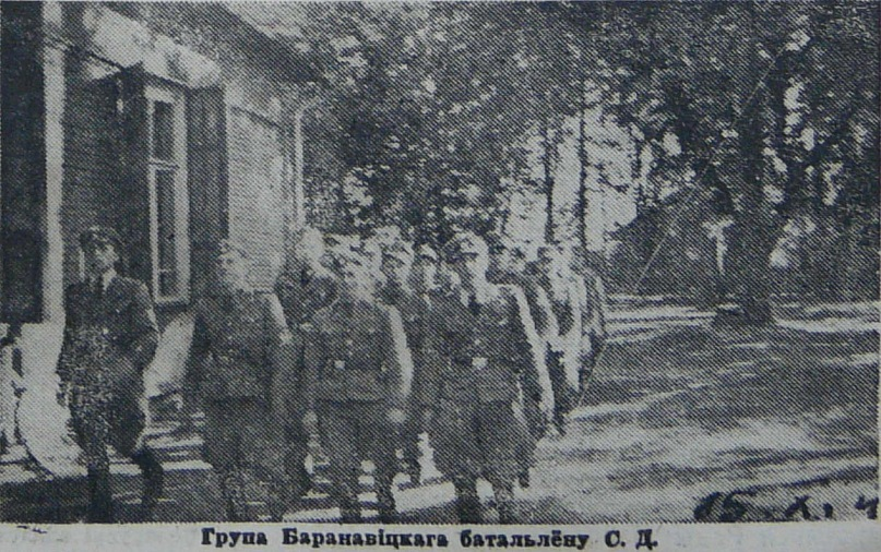 Група афіцэраў 13-га беларускага батальёна пры СД Беларуская (тарашкевіца): Суполка афіцэраў 13-га беларускага батальёну пры СД